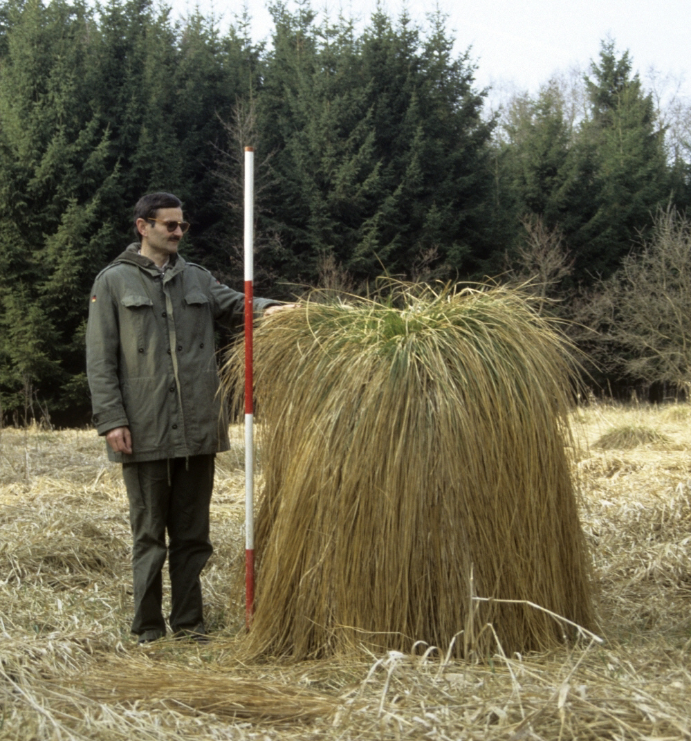 1,40 m hohe Rispensegge bei Aulendorf (Baden-Württ.). Ging 1992 ins Guinnes-Buch der Rekorde ein.